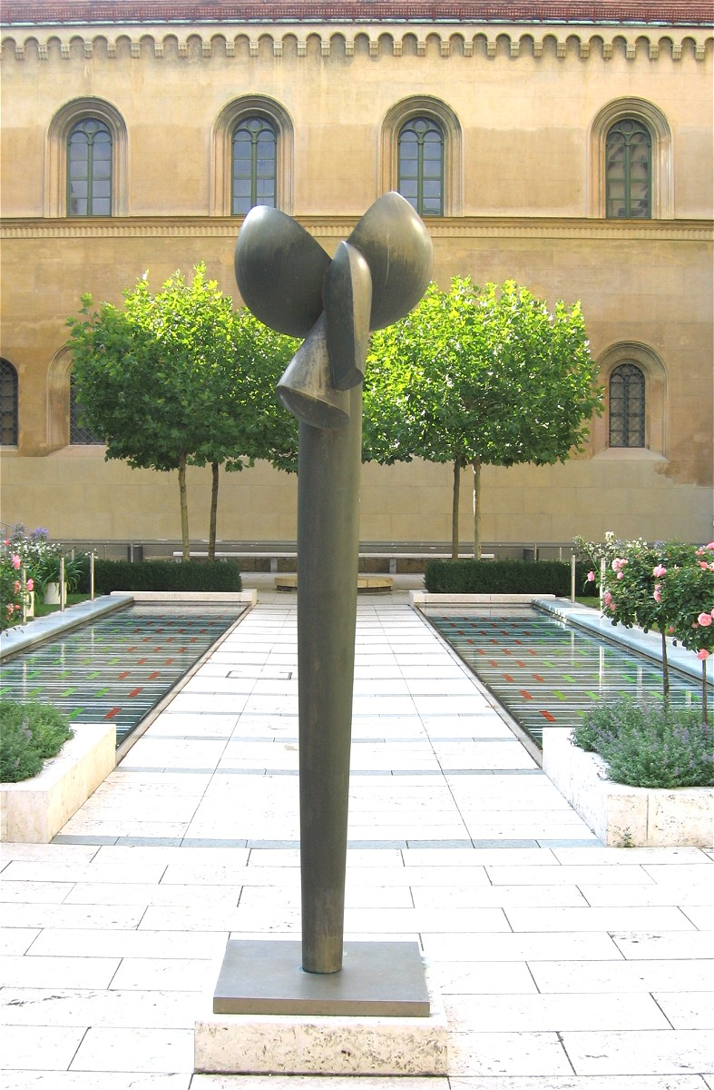 Fritz Koenig, Flora III, 1971, im Kabinettsgarten der Münchener Residenz